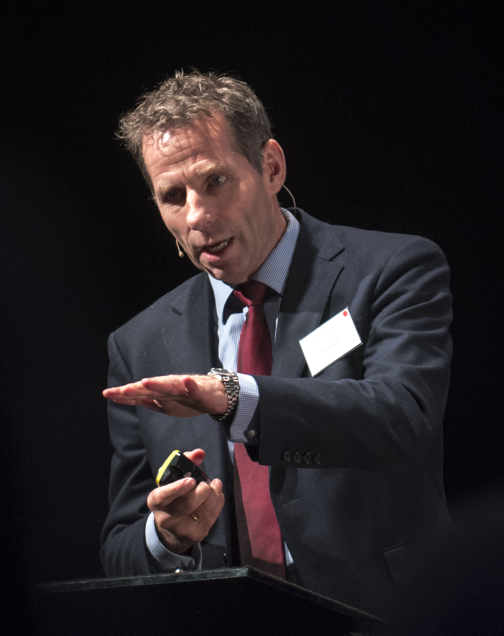 Jarand Rystad i Rystad Energy under historisk seminar 3. november 2016 i Ballroom i Oslo. Foto: Olav Standal Tange, Norsk olje og gass